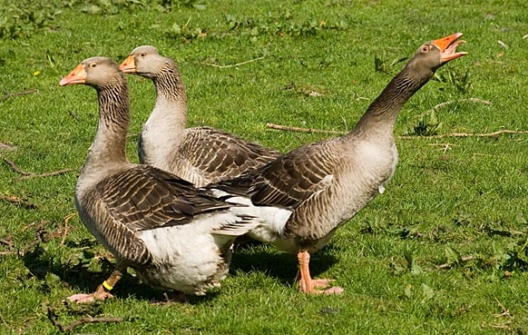 Två danska lantgåsdamer med argen gåskarlen